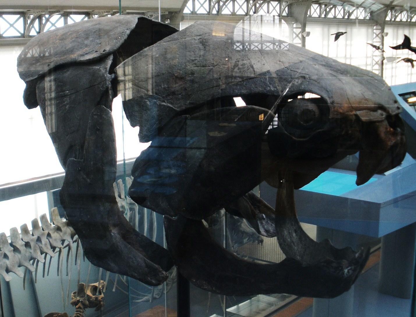 Fossil of Dunkleosteus, an extinct fish Took the photo at Musee d'Histoire Naturelle, Brussels